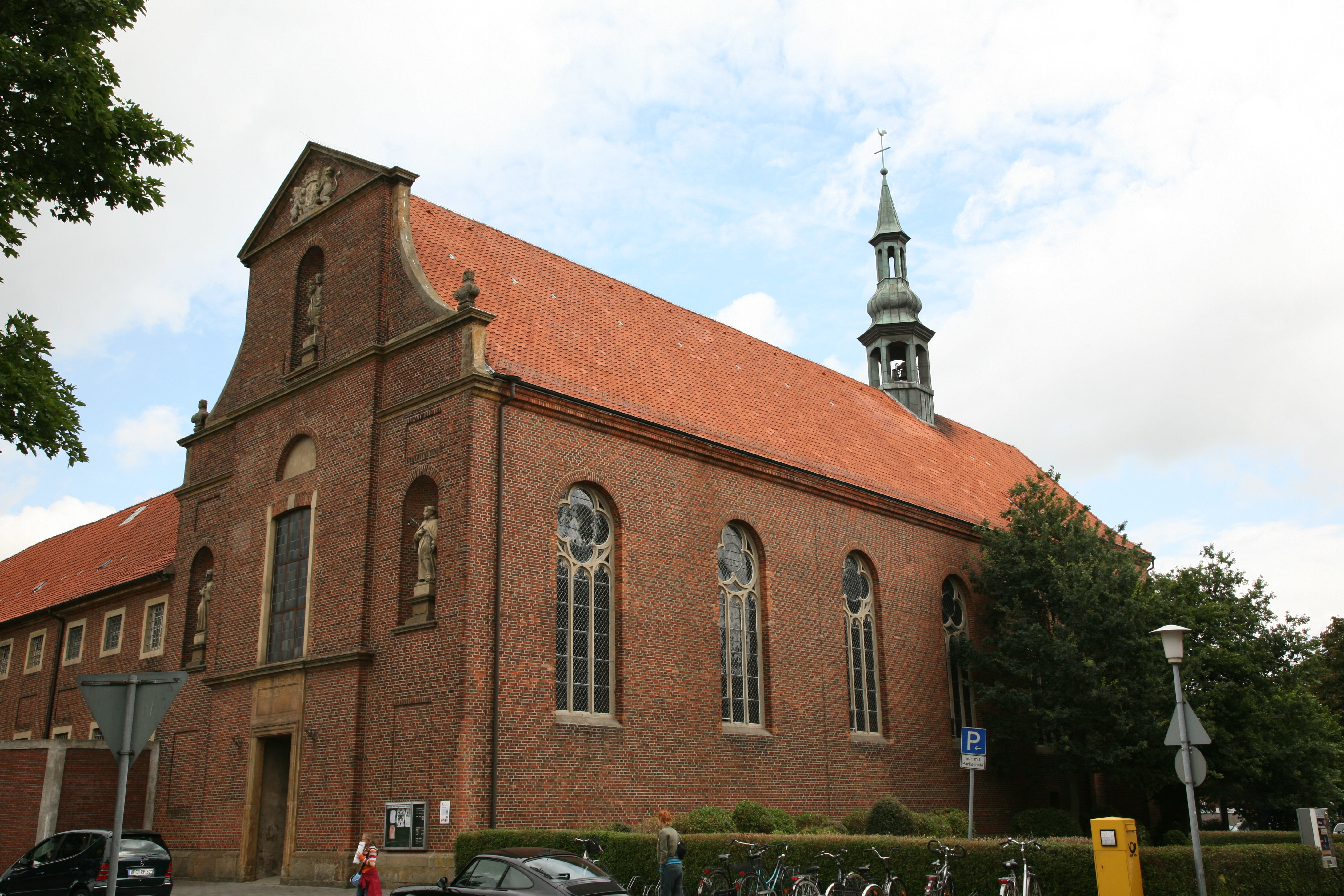 The Klosterkirche is an evangelical church in Vechta, Niedersachsen